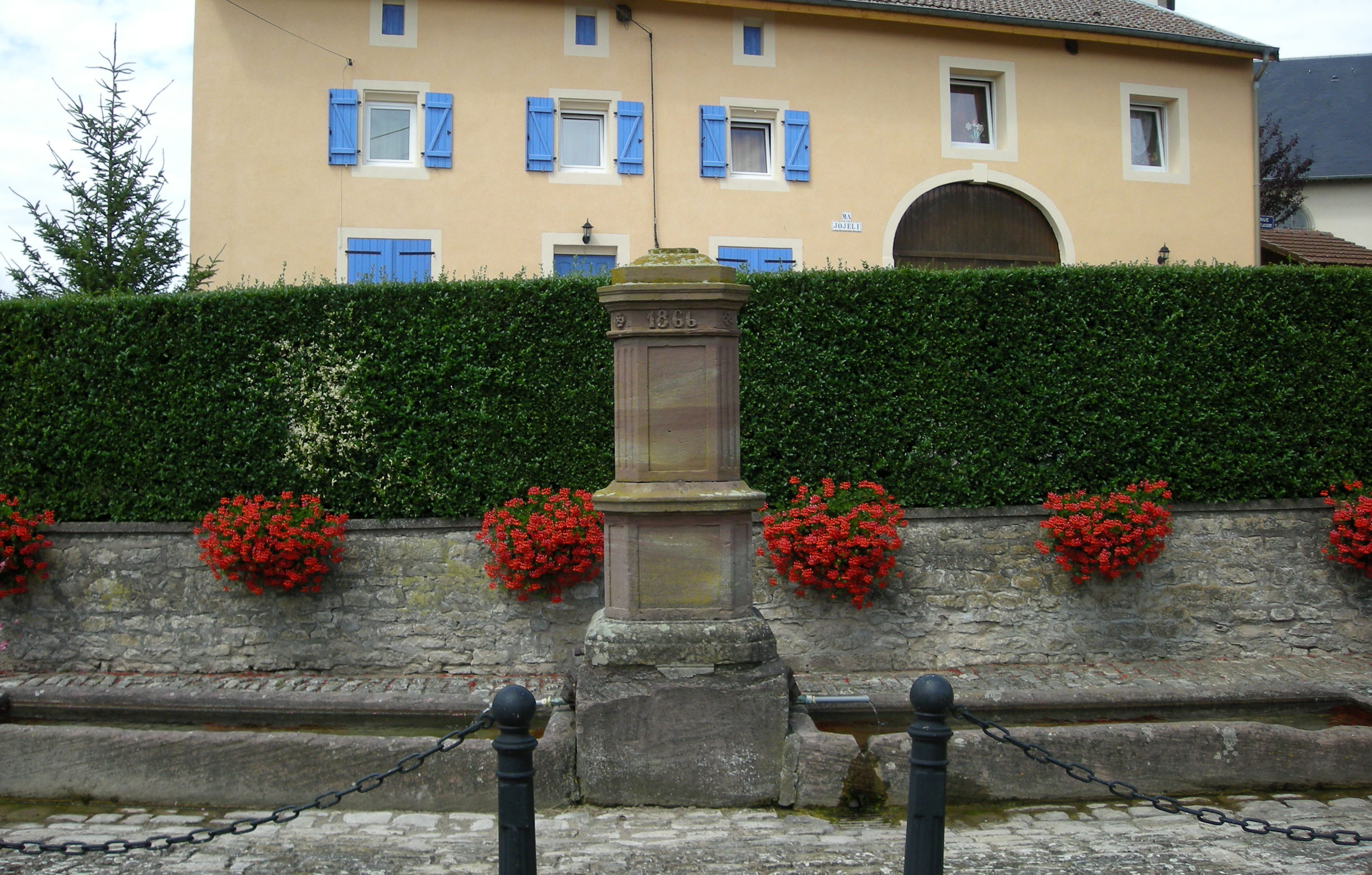 Lavoir double de Gélacourt (Meurthe-et-Moselle)